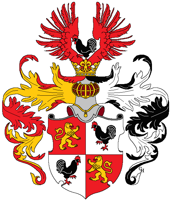 Wappen der österreichischen Familie Rutzky von Brennau. Der k.u.k. Major der Artillerie Edmund Rutzky (1834–1893) wurde 1884 als "Edler von Brennau" in den österreichischen Adelsstand erhoben; sein Bruder, der k.u.k. Generalmajor Andreas Rutzky (1829–1896), erhielt den österreichischen Adelsstand als "Edler von Brennau" 1887. Zeichnung von Gerd Hruška ( Für weitere Informationen zu dieser Standeserhebung siehe (